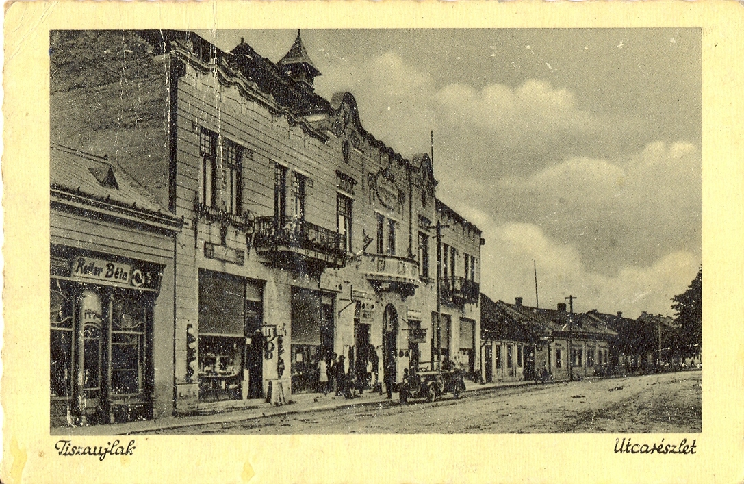 Tiszaújlak a 20. század fordulóján